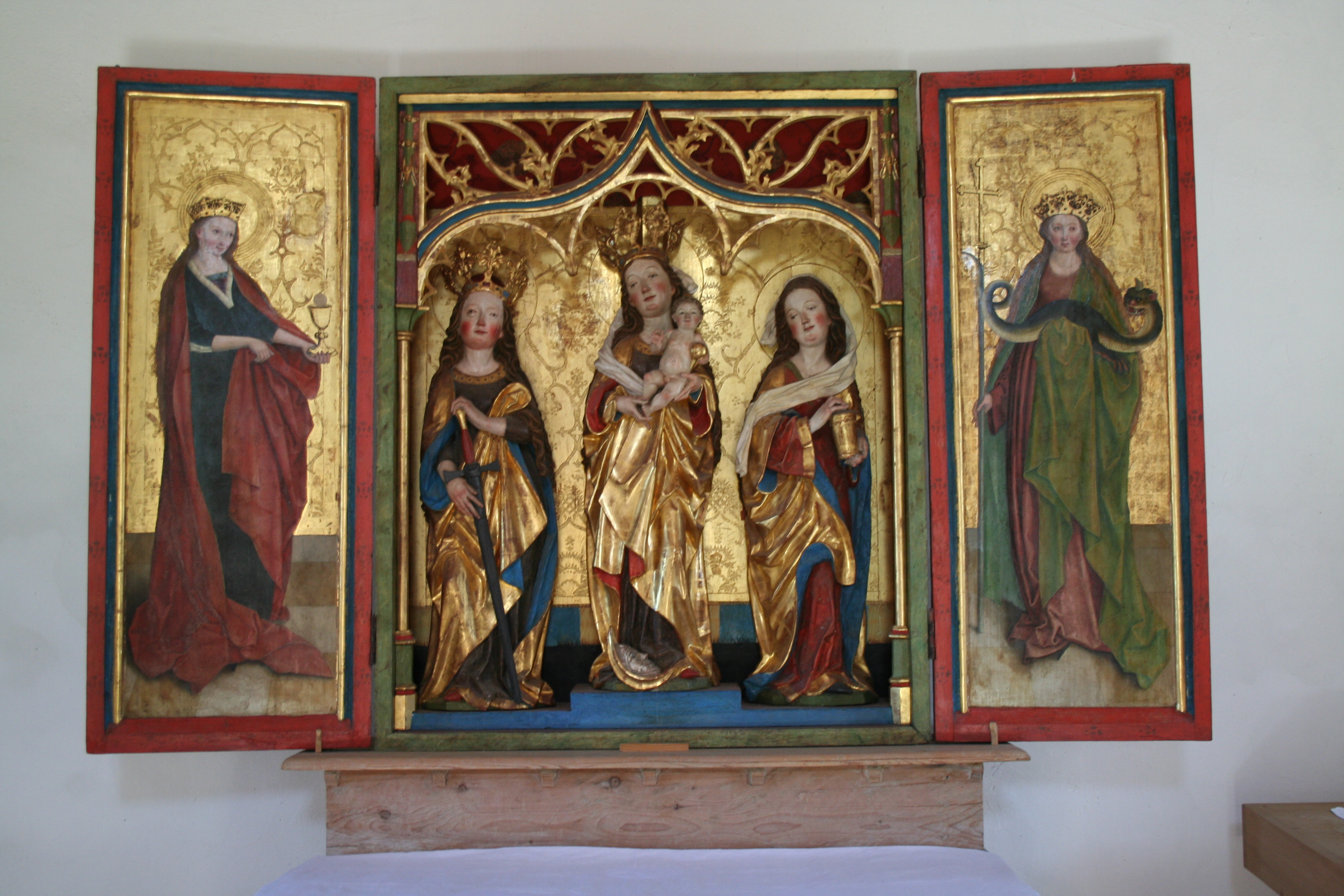 Altar der St. Georgskapelle in Obersaxen